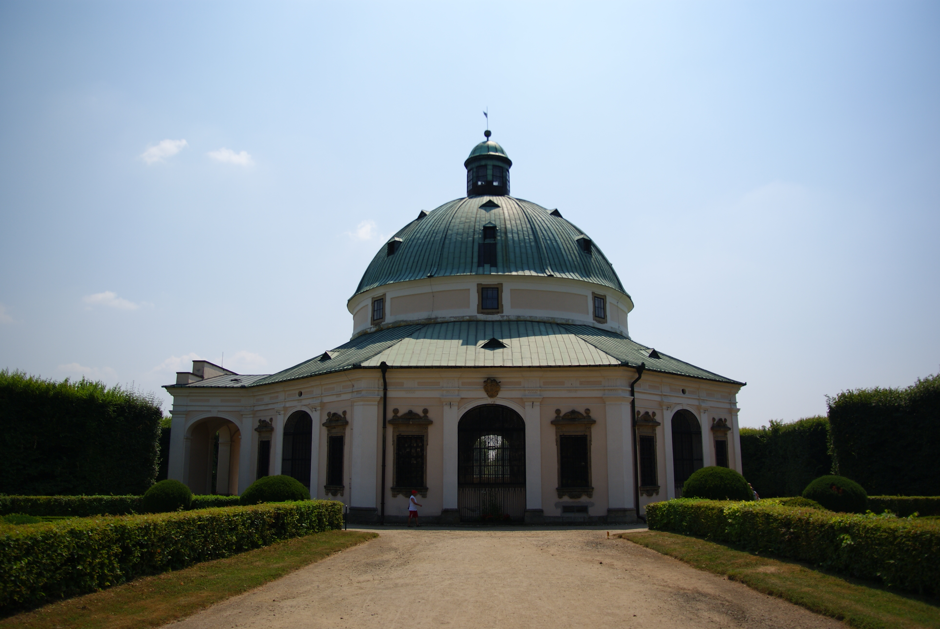 Park Květná zahrada (Kroměříž), Gen. Svobody, Kroměříž